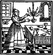 Lighting The Sabbath Lamp. Amsterdam, 1695.